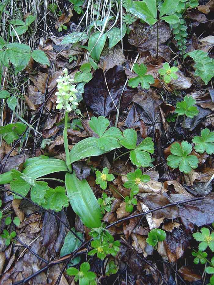 Orchis pallens in Vergesellschaftung mit der Grünen Schaftdolde (Hacquetia epipactis) und der Hunds-Zahnlilie (Erythronium dens-canis, hier nur Blätter). Ort: Slowenien (Kolpatal), Mai 2003